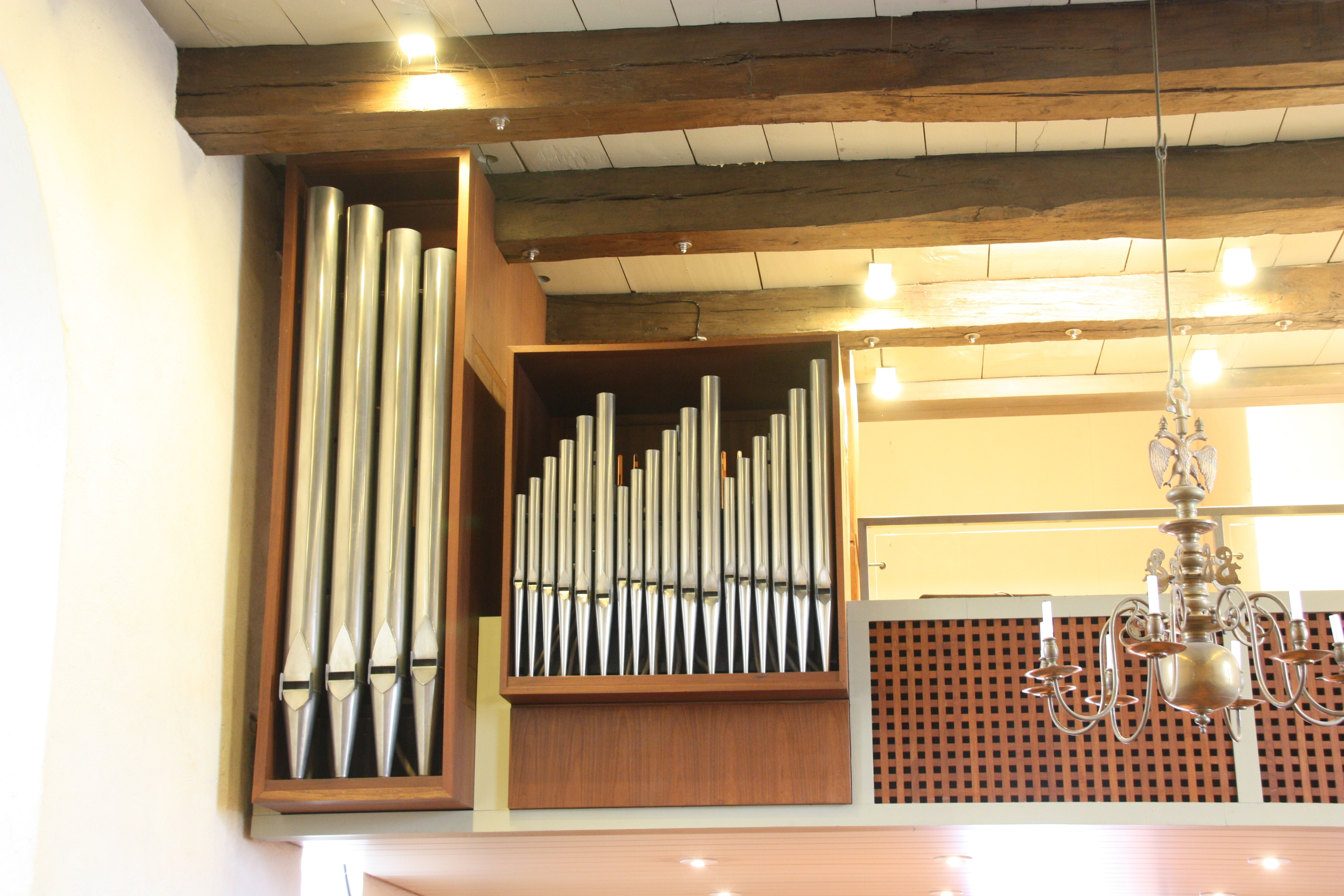 Hamburg, Kirche Alt-Rahlstedt, Orgelprospekt, Führer-Orgel von 1965